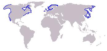 Bewerking afbeelding: Afbeelding_(kaart).JPG